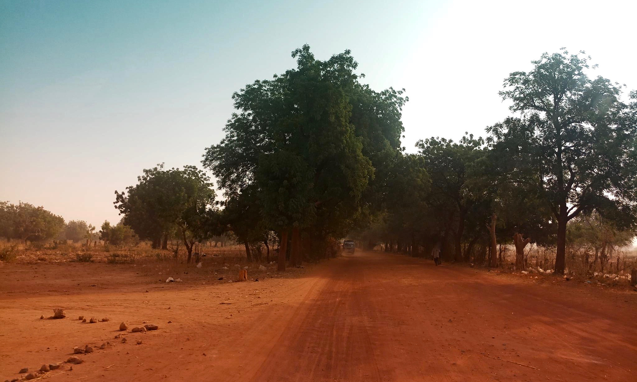 Nationalstraße 27 im Tamou-Wildreservat, Gemeinde Tamou, Niger.